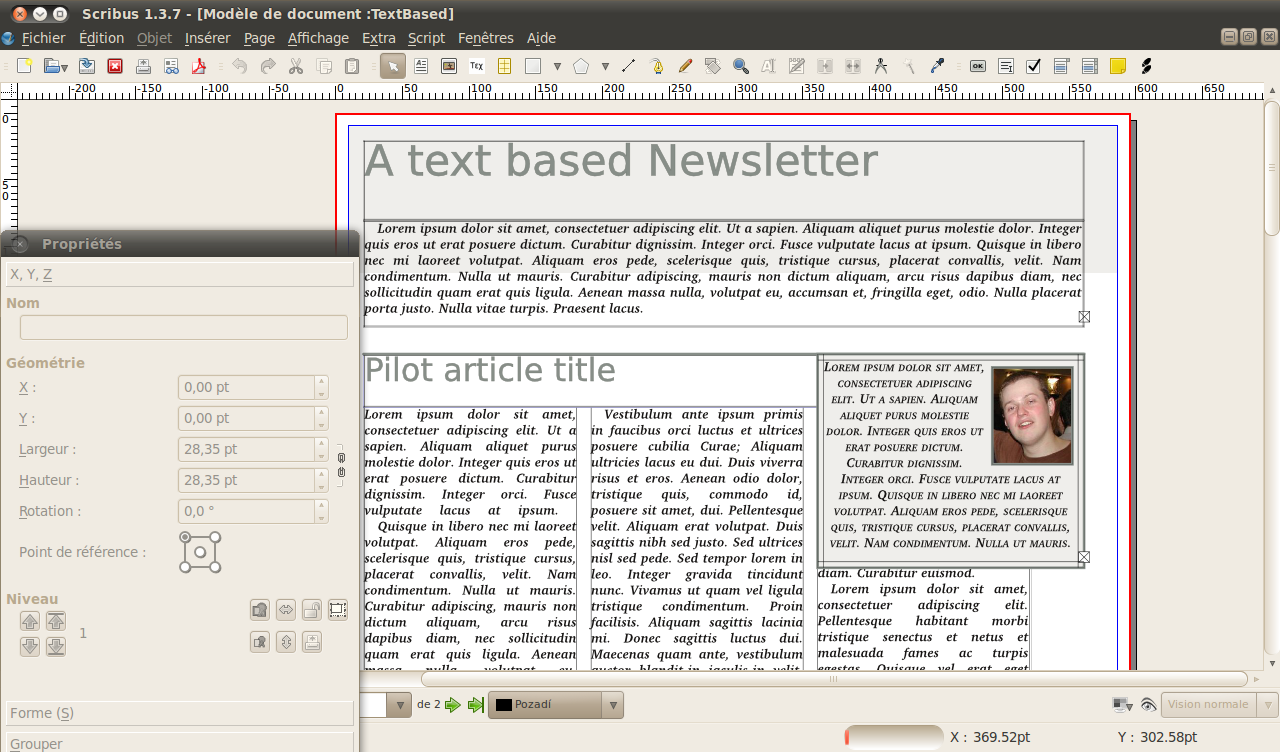 Aperçu du logiciel Scribus 1.3.7